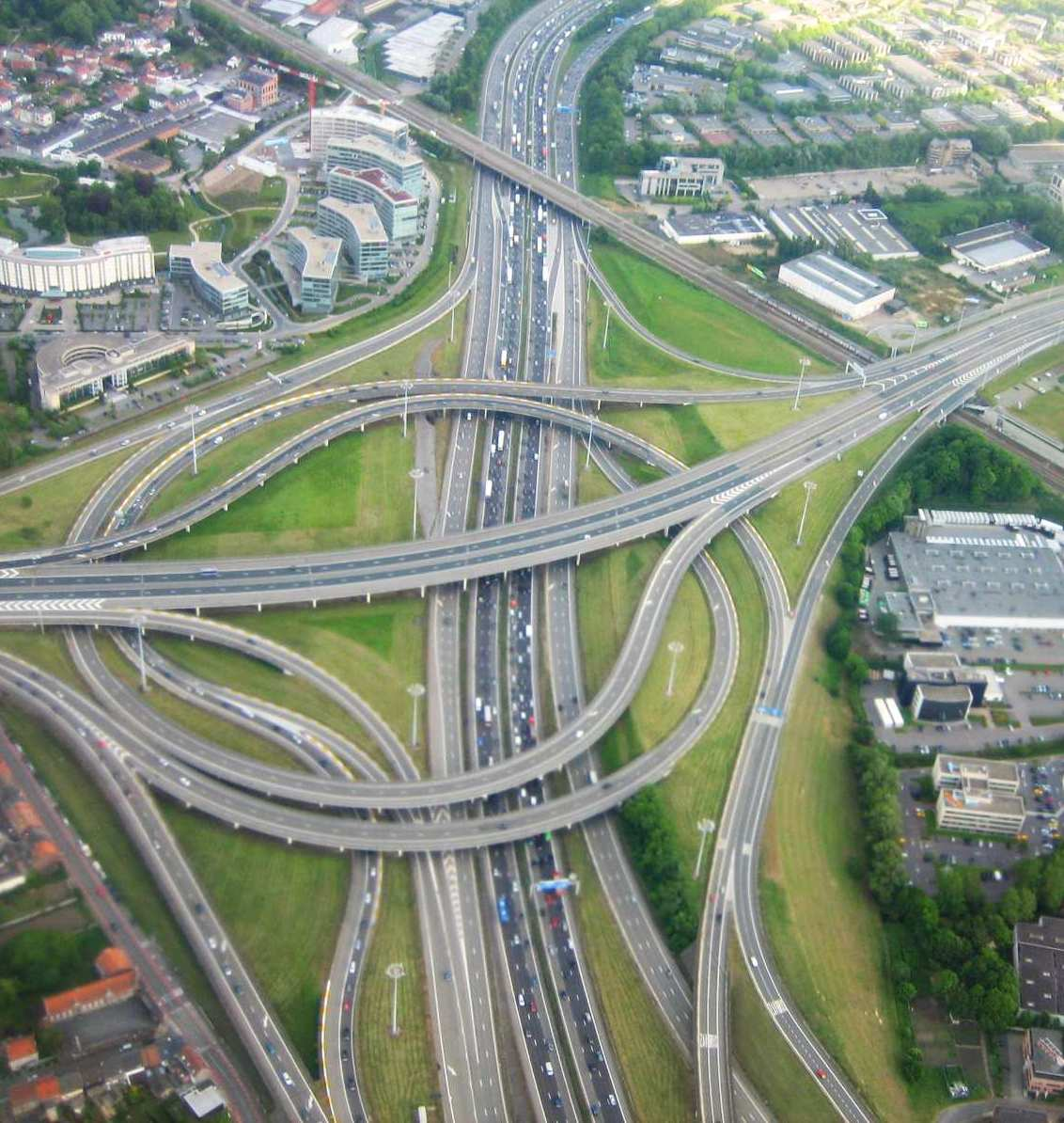 D'Autobunnskräiz vum Ring O an der A201 an der Belsch.